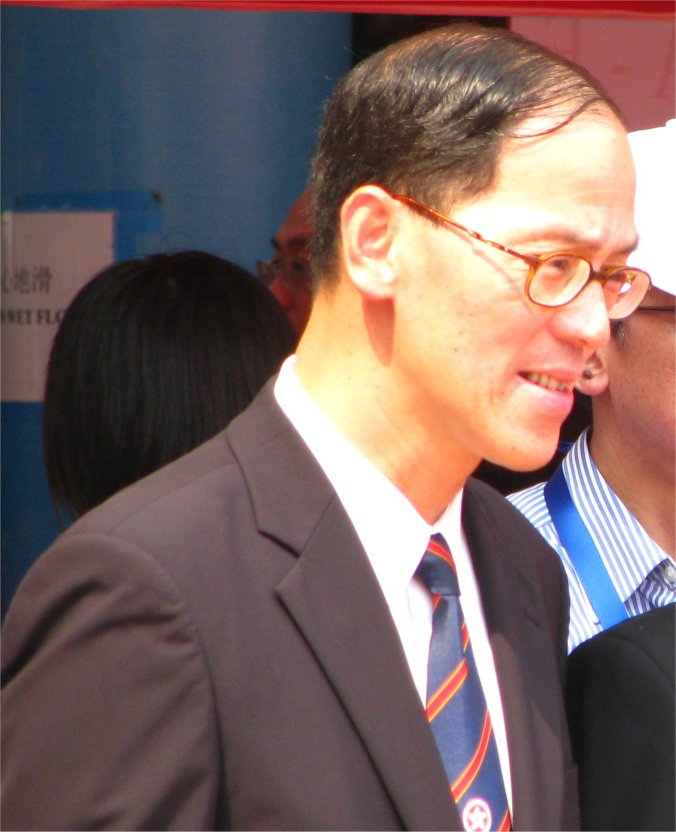 Tsang Tak-sing